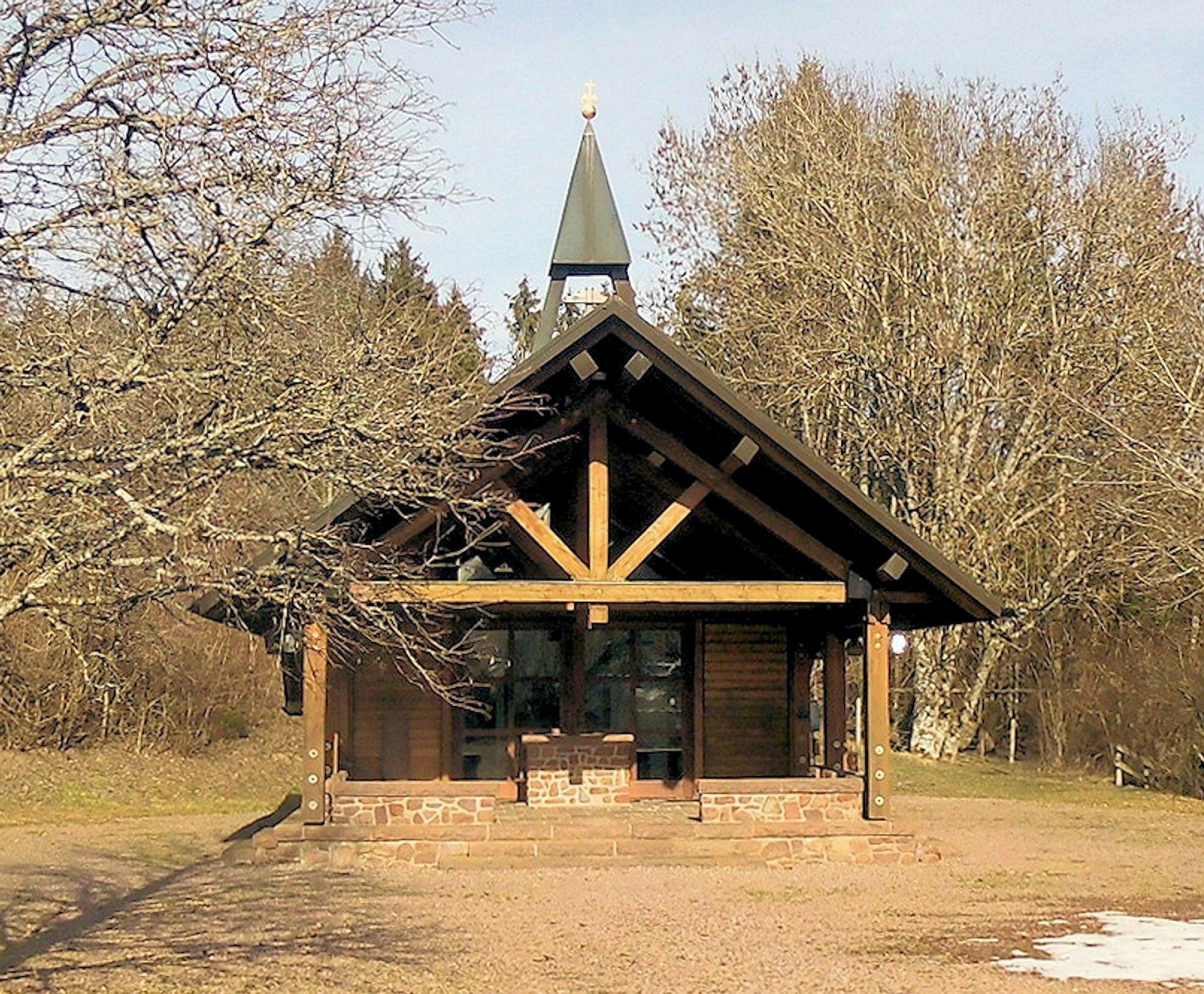 Fatima-Kapelle zum Unbefleckten Herzen Mariens in Bierbronnen